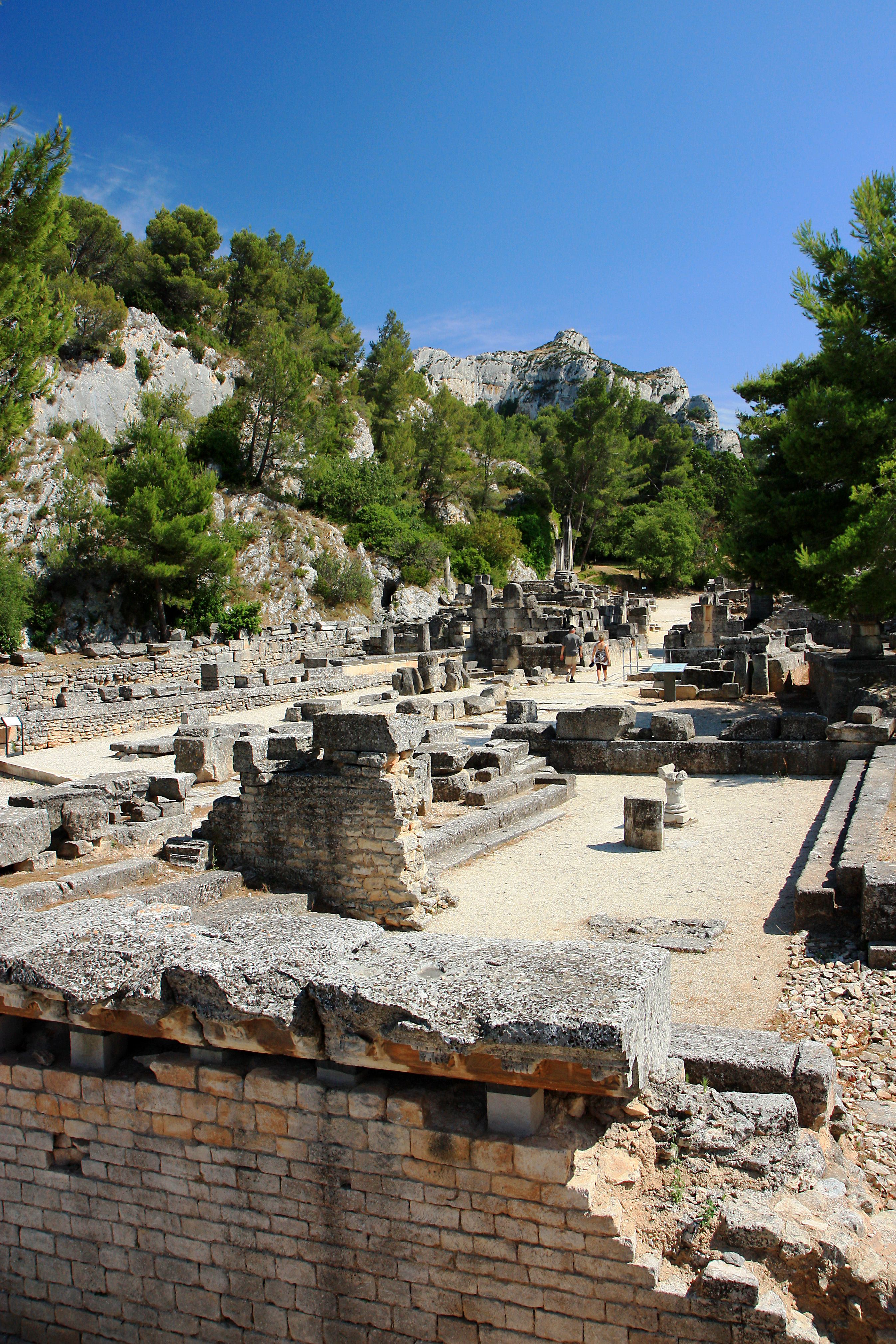 Bouleuterion in Glanum